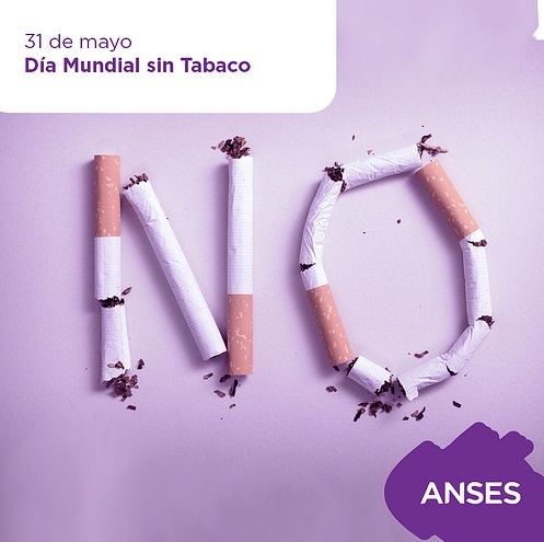 Cartaz comemorativo do Dia Mundial sem Tabaco, elaborado e veiculado na Argentina pela Administración Nacional de la Seguridad Social em 2016.